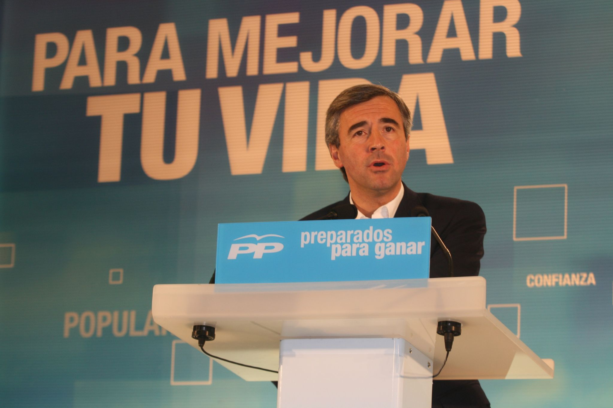 Ángel Acebes en las Jornadas 'Para Mejorar tu Vida', organizadas por el Partido Popular en Barcelona, en noviembre de 2007.